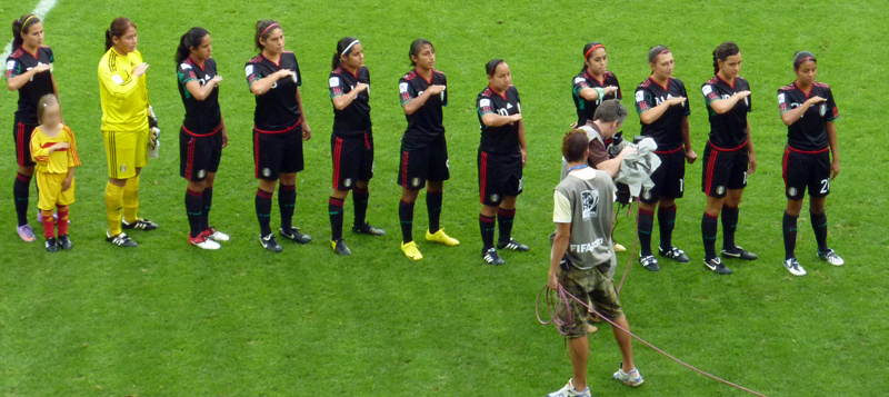 FIFA U-20-Weltmeisterschaft der Frauen 2010, Mexikanische Nationalmannschaft, Spiel 13 in Augsburg